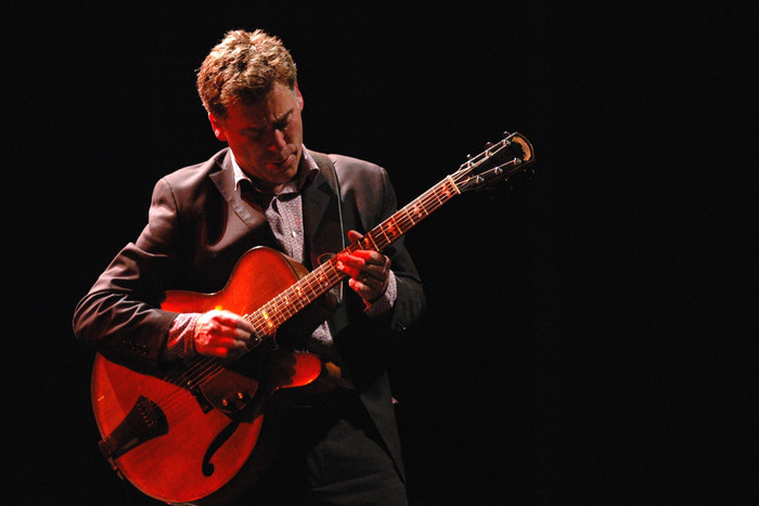 Peter Bernstein en la apertura del Festival de Jazz en la Usina del Arte